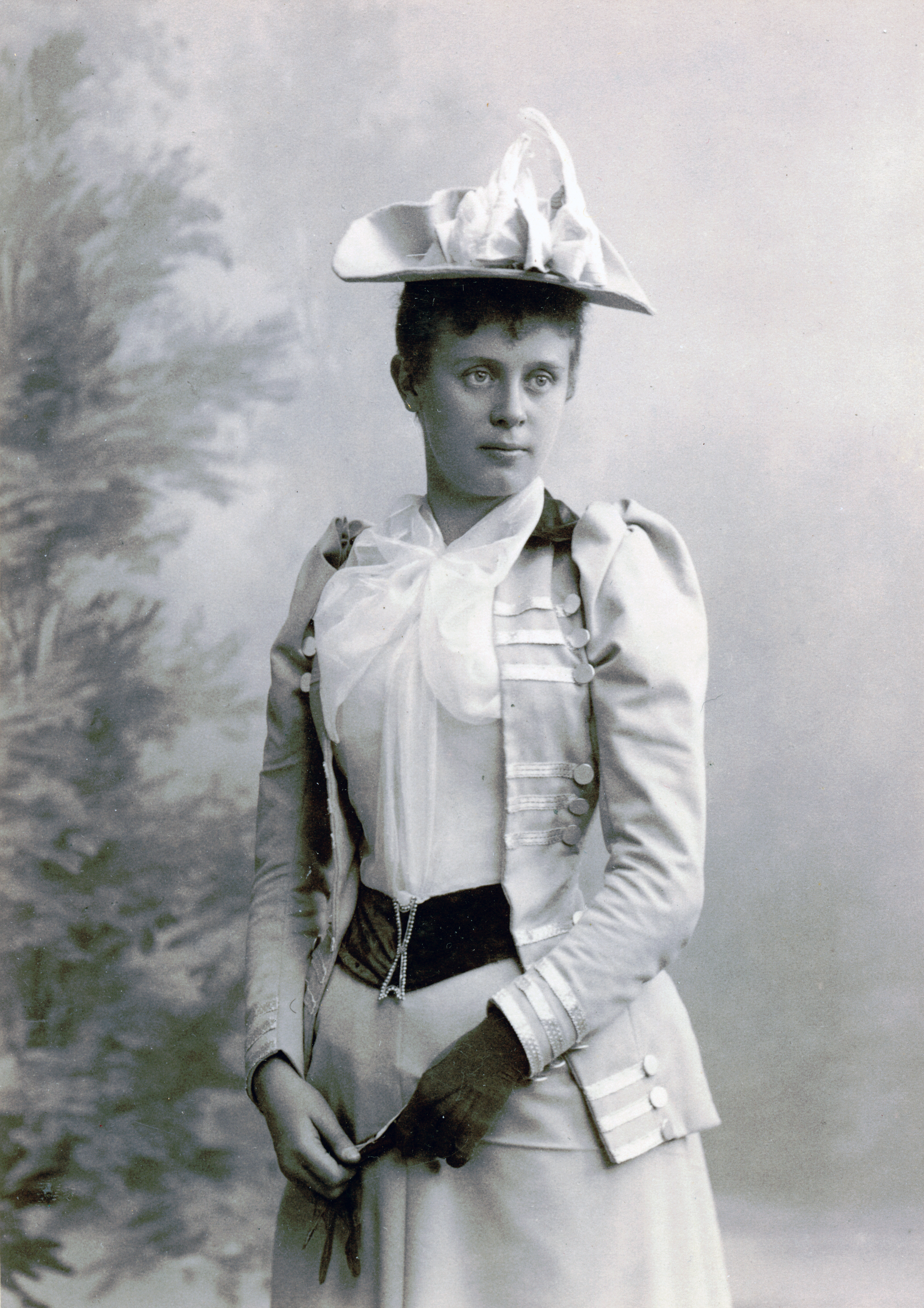 Constance Behrens, skådespelare vid Kungliga Dramatiska teatern 1891